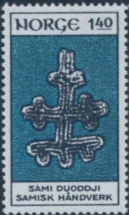 Norwegian 1973 stamp showing pewter embrodery in southern saami style